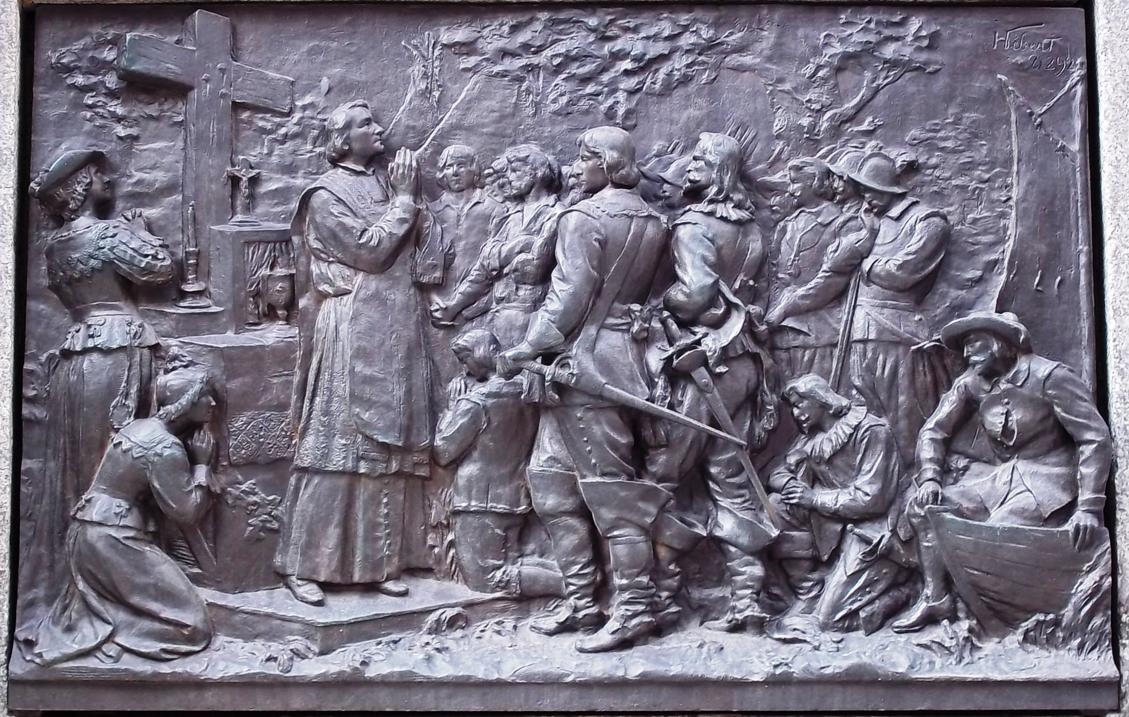 Bas-relief de Louis-Philippe Hébert, 1895, Monument à Maisonneuve, Place d'Armes, Montréal. Première messe à Ville-Marie en 1642 par le père Barthélemy Vimont, jésuite.